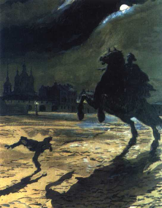 Иллюстрации Бенуа к «Медному всаднику» Пушкина 1899-1905 годы